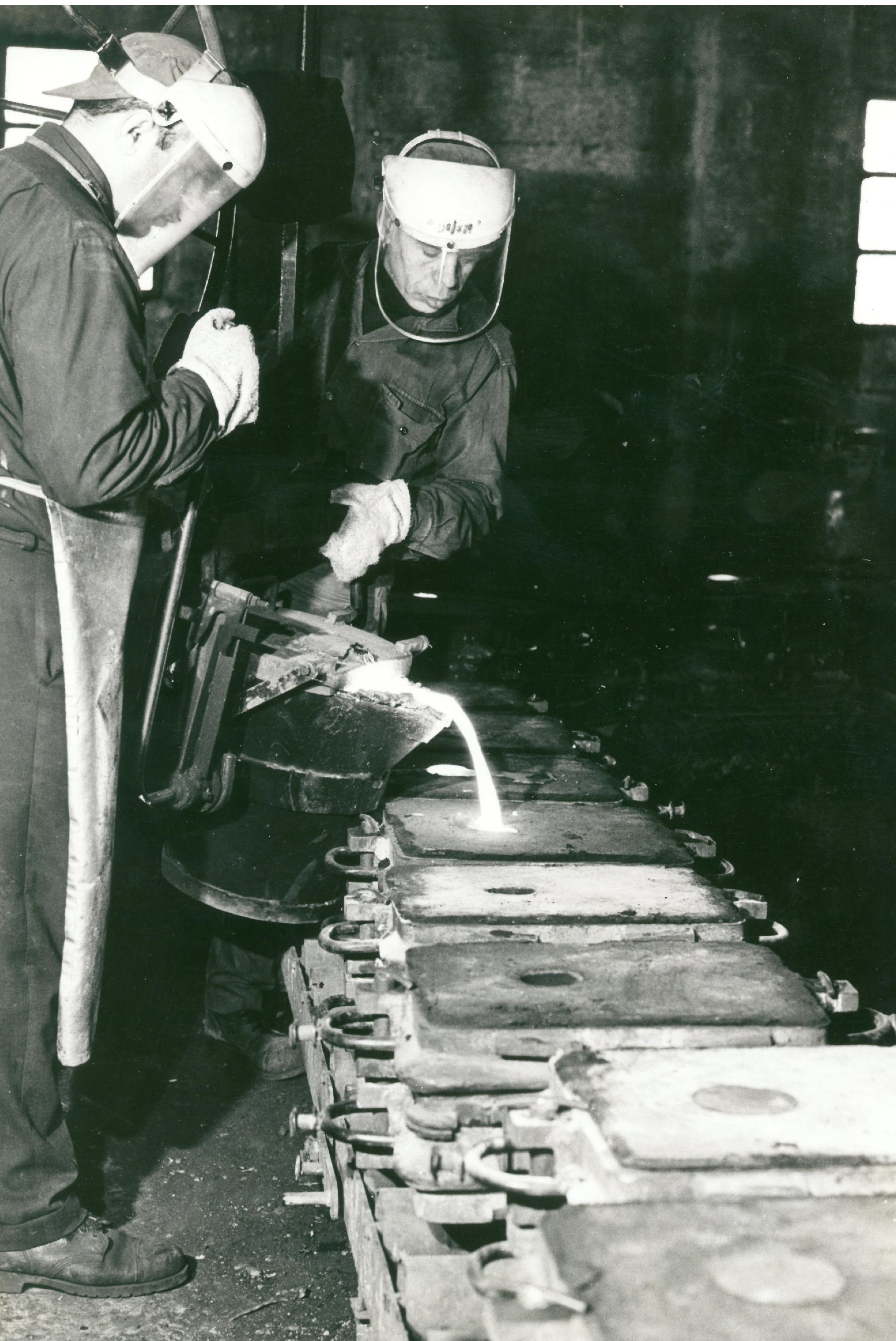 מפעל גרינשפון - יציקה בתבניות